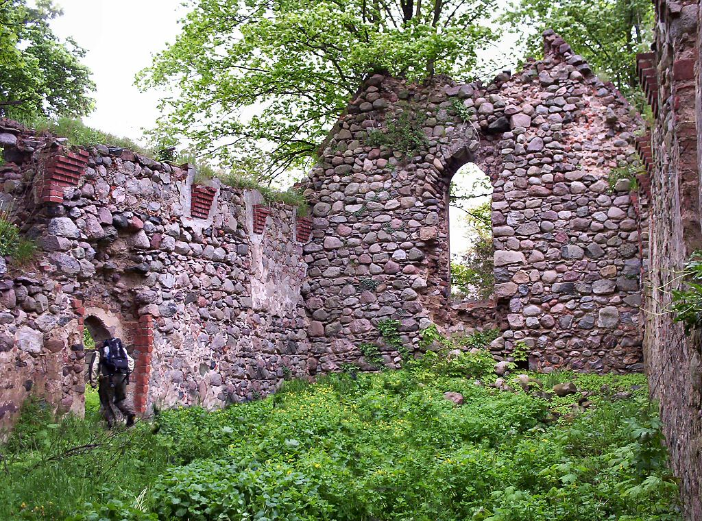 Równo - ruina kościoła, XIII 12.1963.